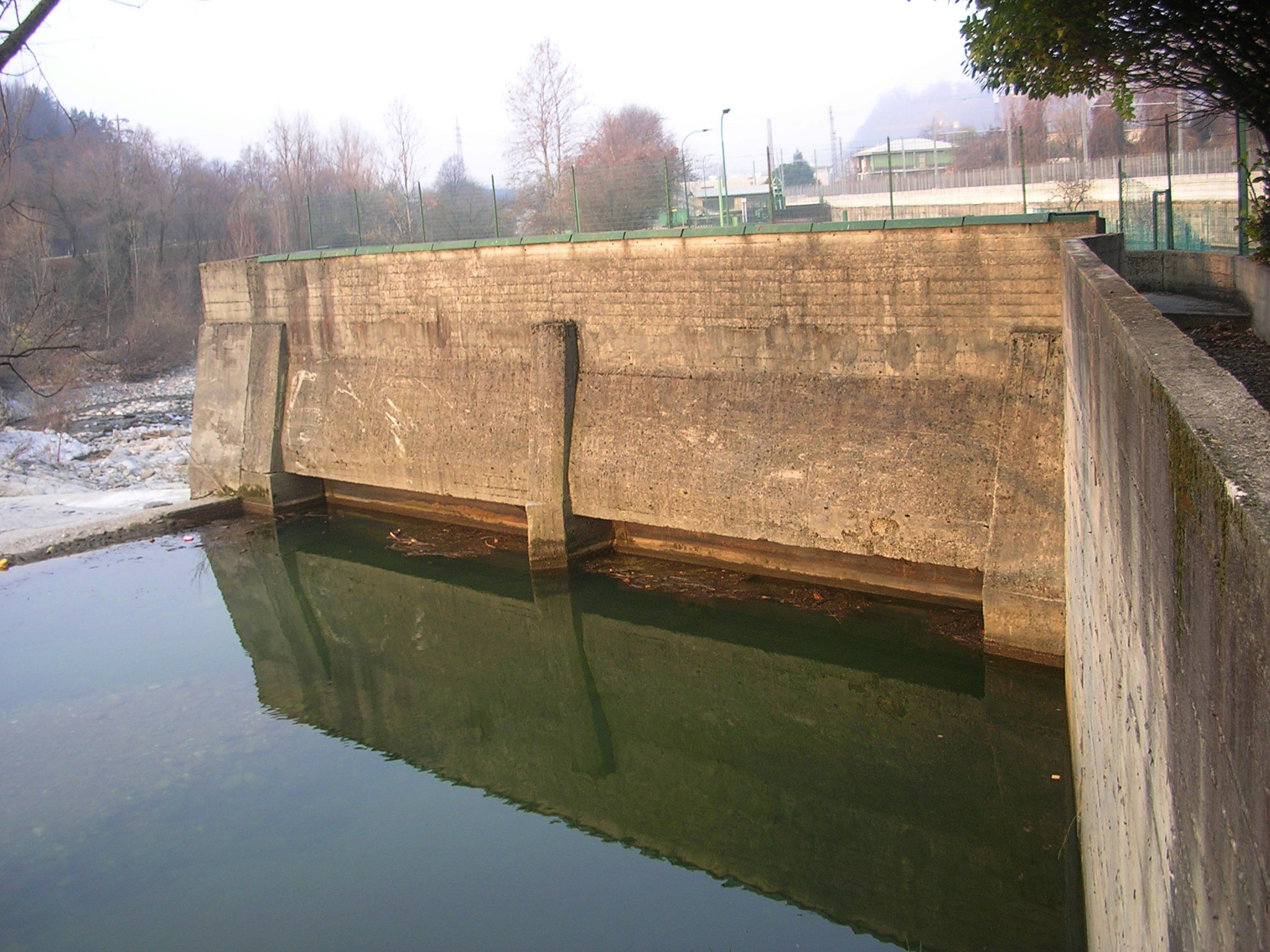 Bocca di presa sul fiume Serio delle rogge Serio Grande, Morlana e Borgogna presso Albino (Bergamo)